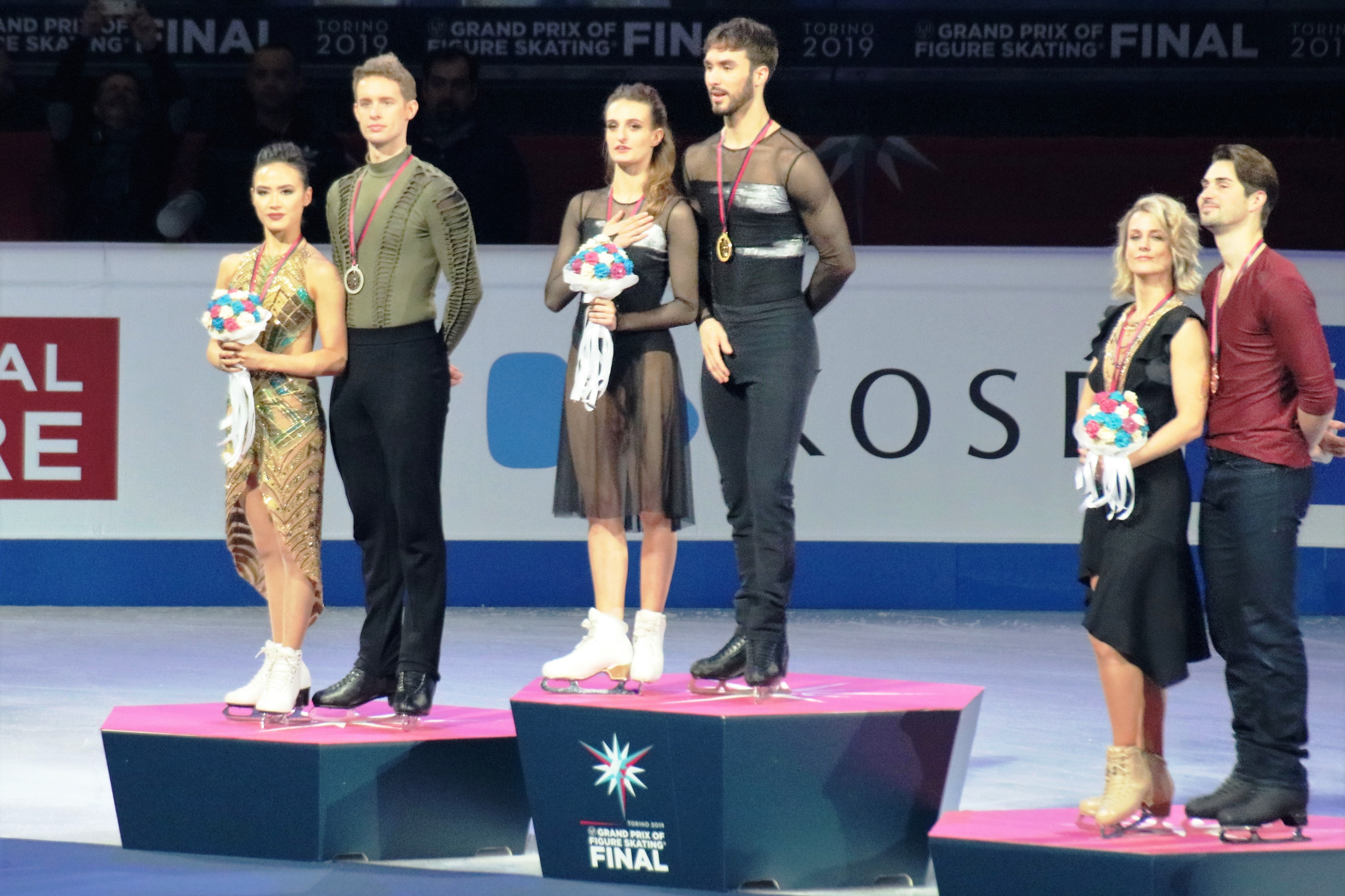 Церемония награждения в танцах на льду на финале Гран-при 2019-2020